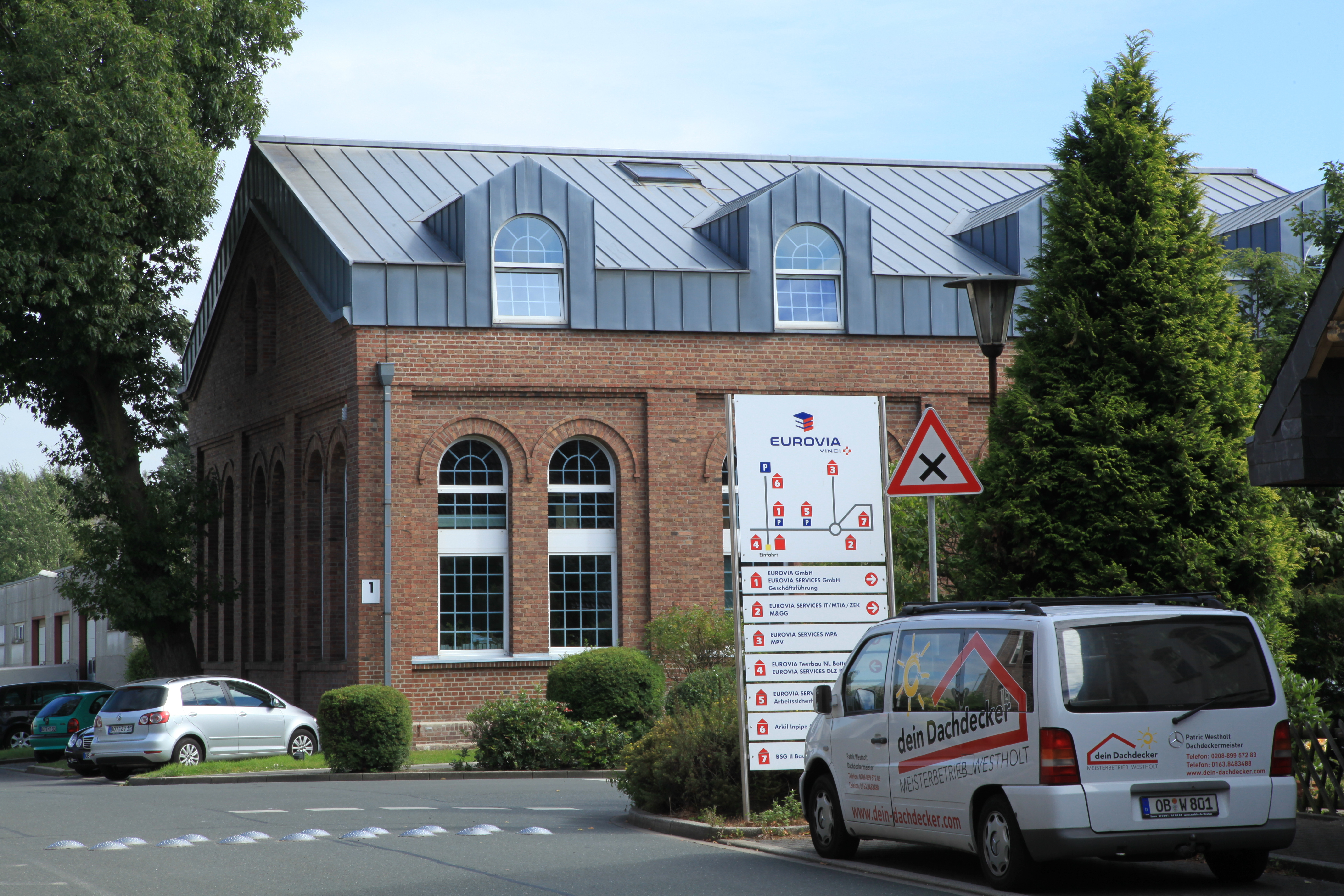 Verbliebene Gebäude der Zeche Rheinbaben, jetzt in Benutzung und auf dem Firmengelände von Eurovia Teerbau GmbH NL Bottrop, Rheinbabenstraße 75 in Bottrop. Die Aufnahmen auf dem eigentlich nicht zugänglichen Firmengelände entstanden mit freundlicher Genehmigung der Eurovia Teerbau GmbH.